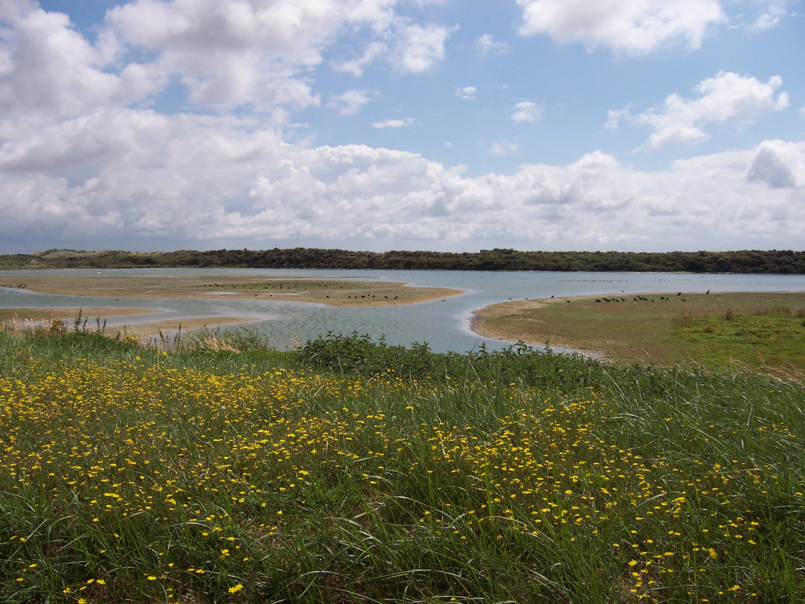 Vue d'ensemble au parc du Marquenterre